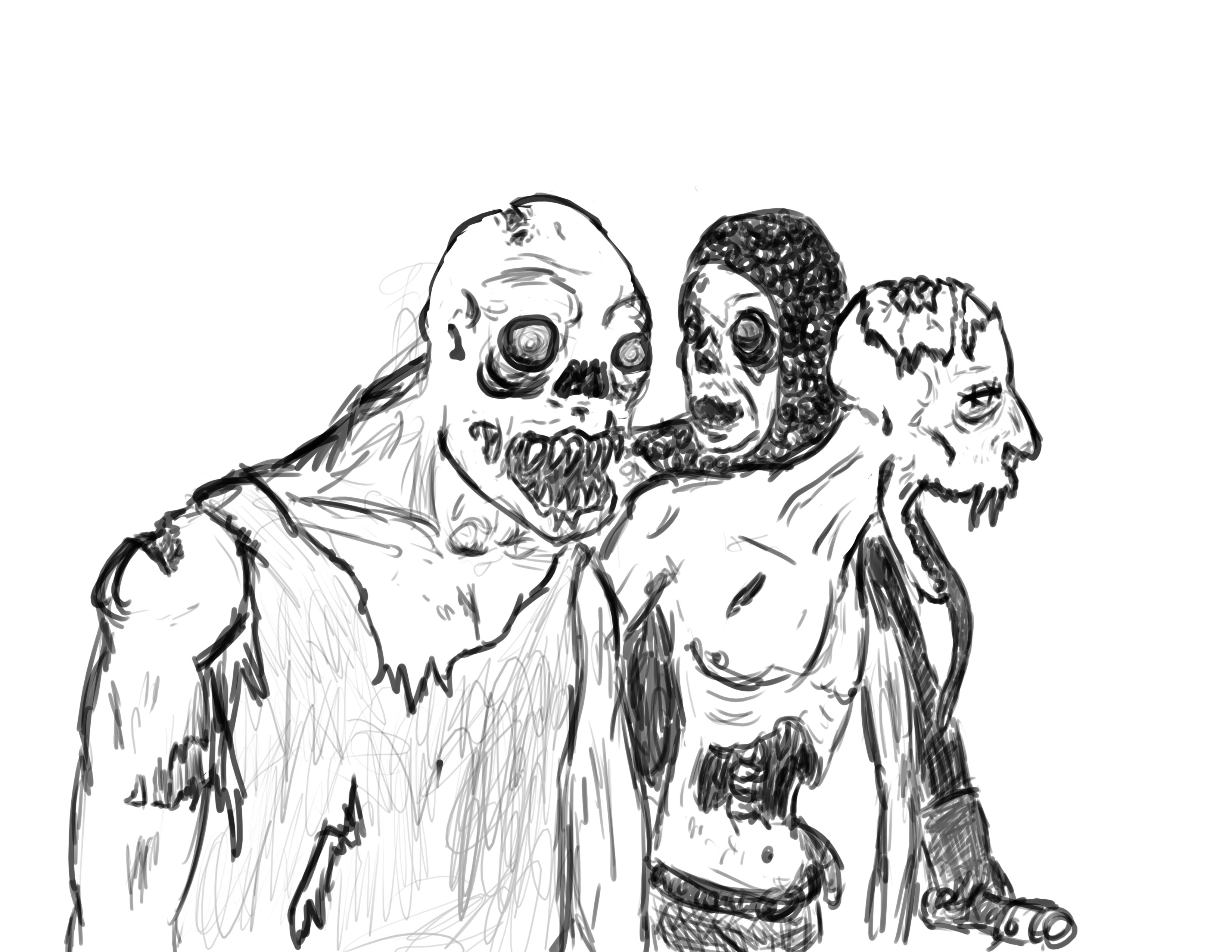 Les mort-vivants sont très présents dans les univers médiévaux fantastiques